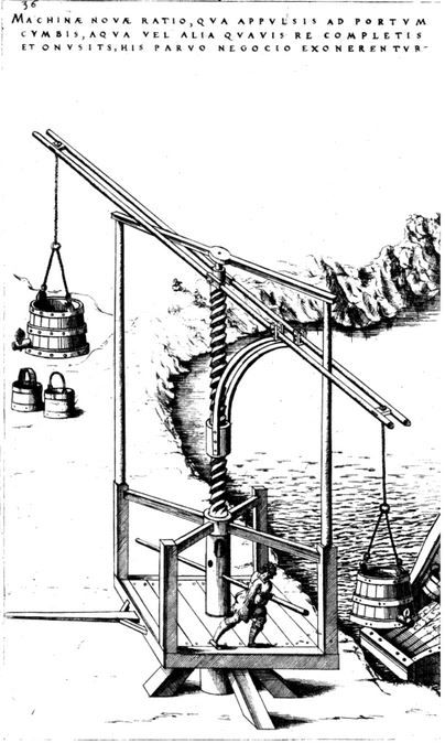 Grue pour décharger les bateaux (figure 36), Jacques Besson, Theatrum intrumentorum, 1578